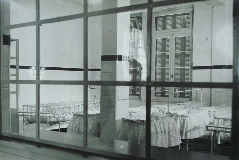 Antiga maternidade da Beneficência Portuguesa de Porto Alegre, Brasil. Repreodução de foto de autor e data desconhecidos, cedida para reprodução na Wiki pelo Arquivo da Beneficência